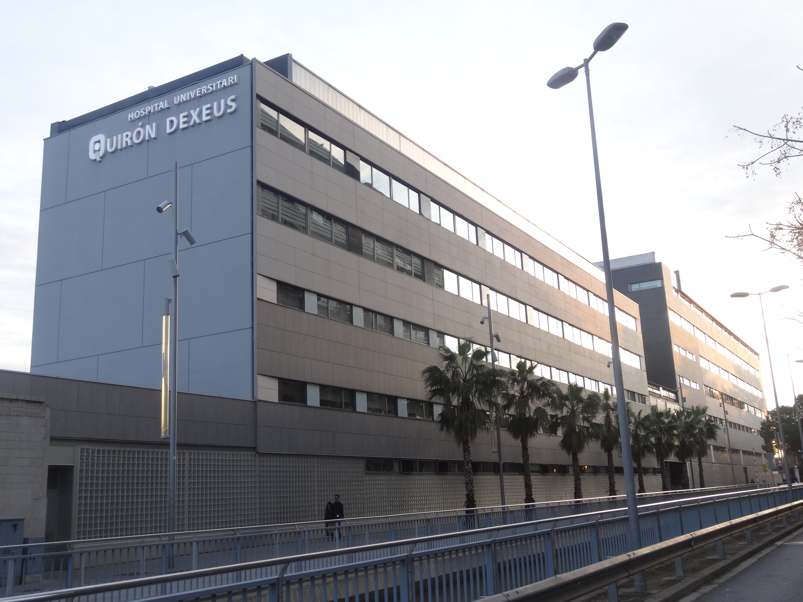 Hospital Universitari Quiron Dexeus